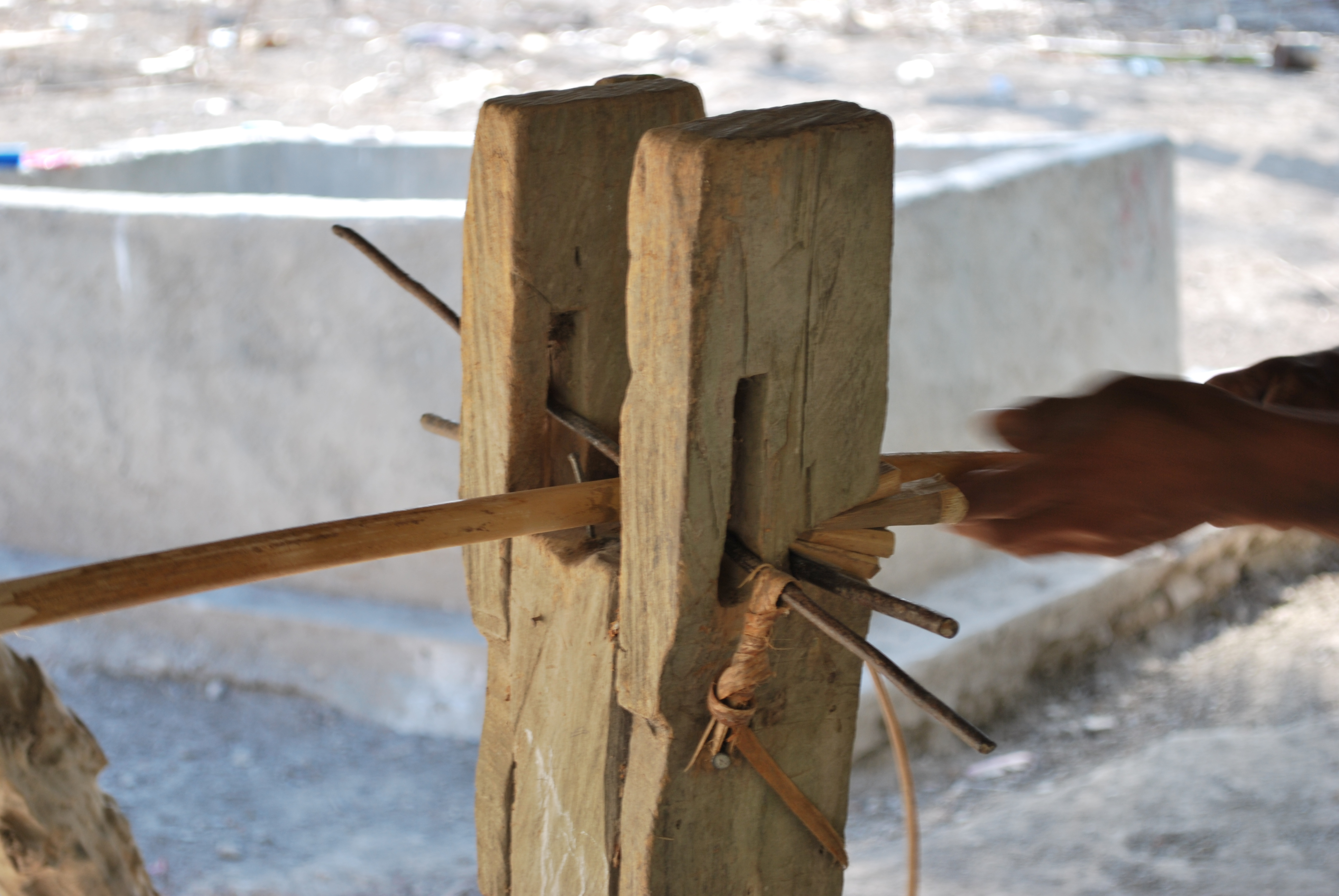 Möbelproduktion aus Binsen in Cova Lima